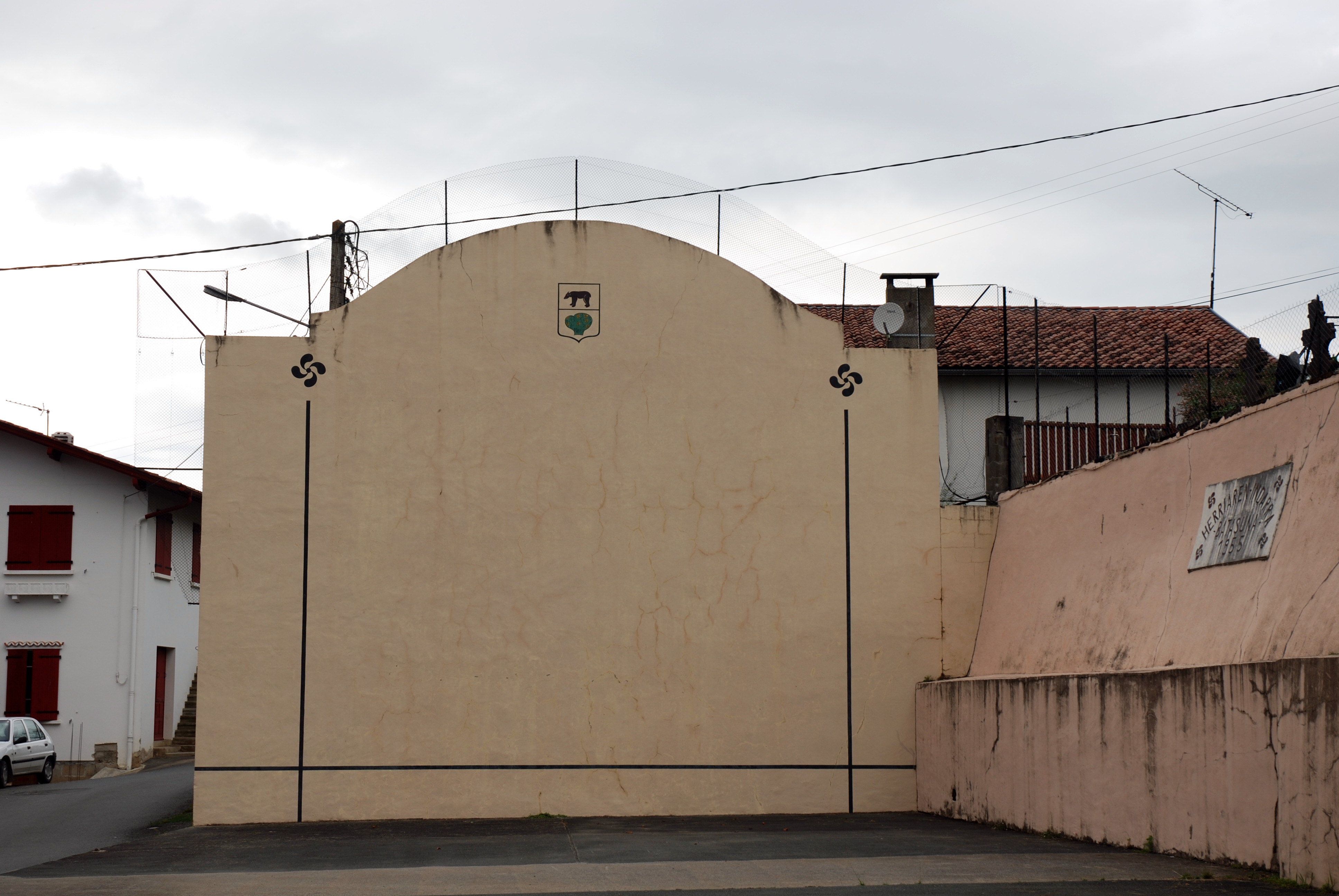 Jaxu, le fronton place libre